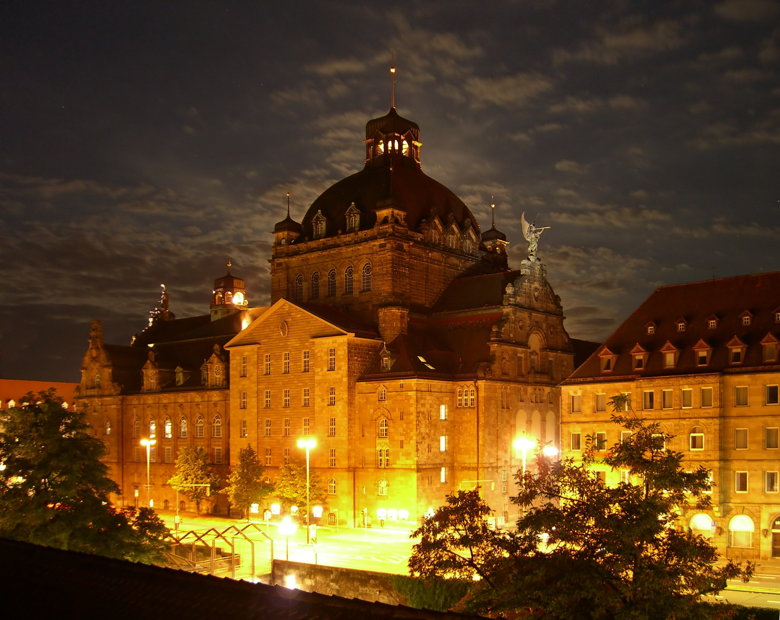 Staatstheater Nürnberg, Montage aus zwei Fotografien mit unterschiedlicher Belichtungszeit